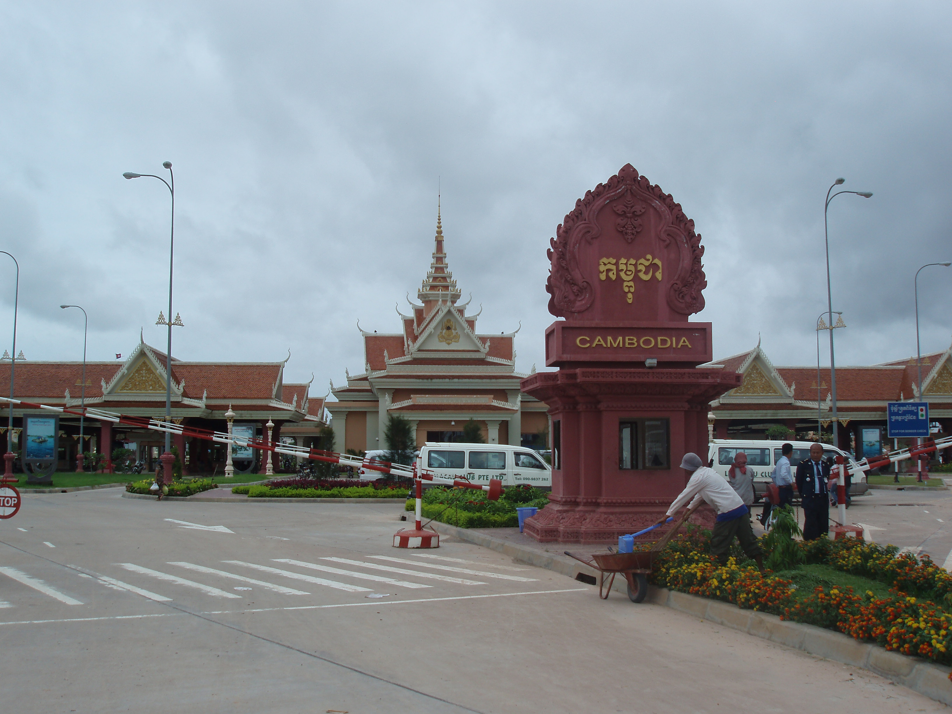 == Giấy phép ==